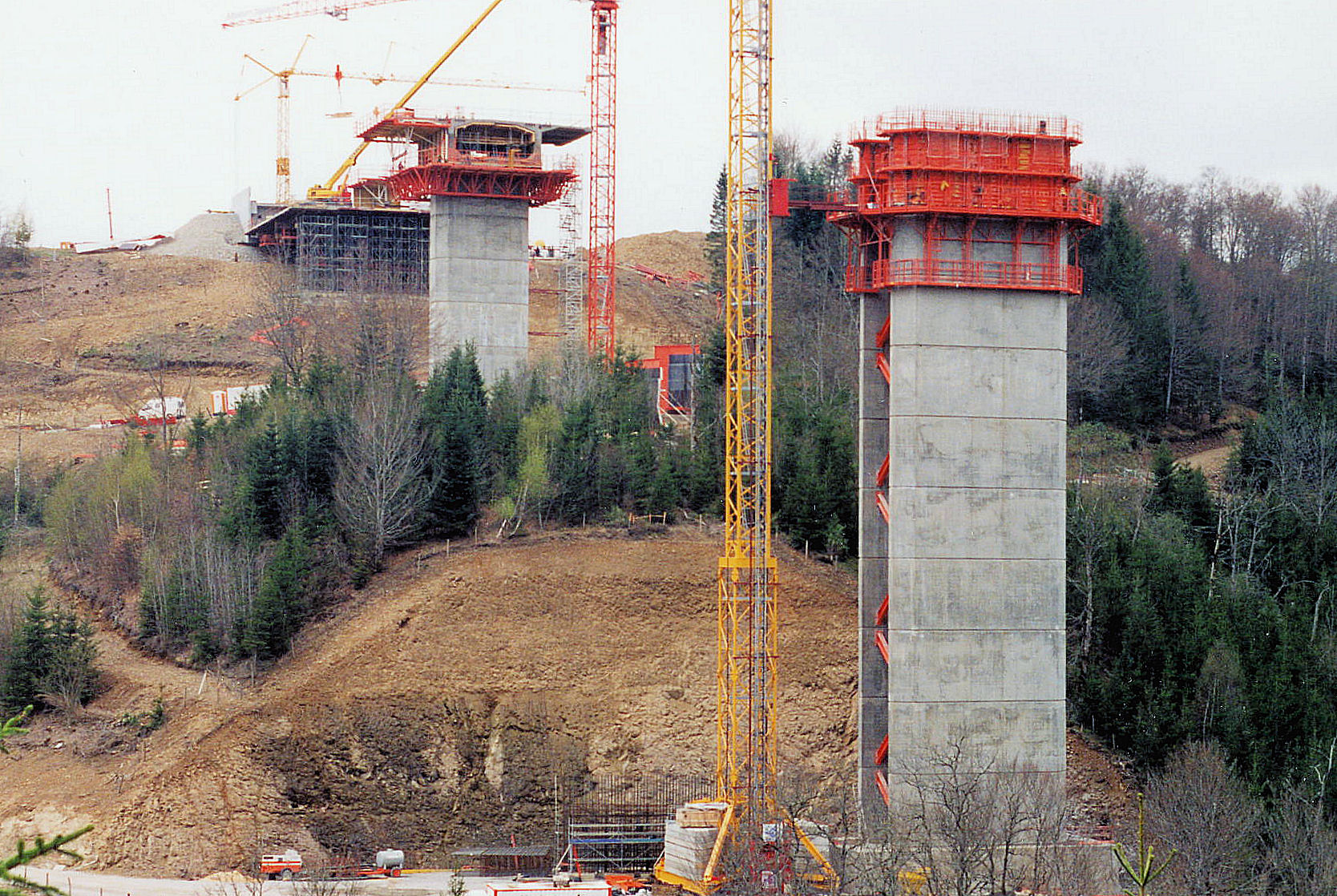 Viaduc de la Barricade - Construction du voussoir sur pile 1 et de la pile P2 avec sa triangulation provisoire entre les 2 voiles. Cintre pour réaliser la partie du tablier coulée en place.